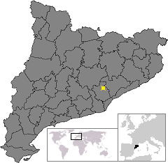 Localització de Castellar del Vallès. Location of Castellar del Vallès in Catalonia.